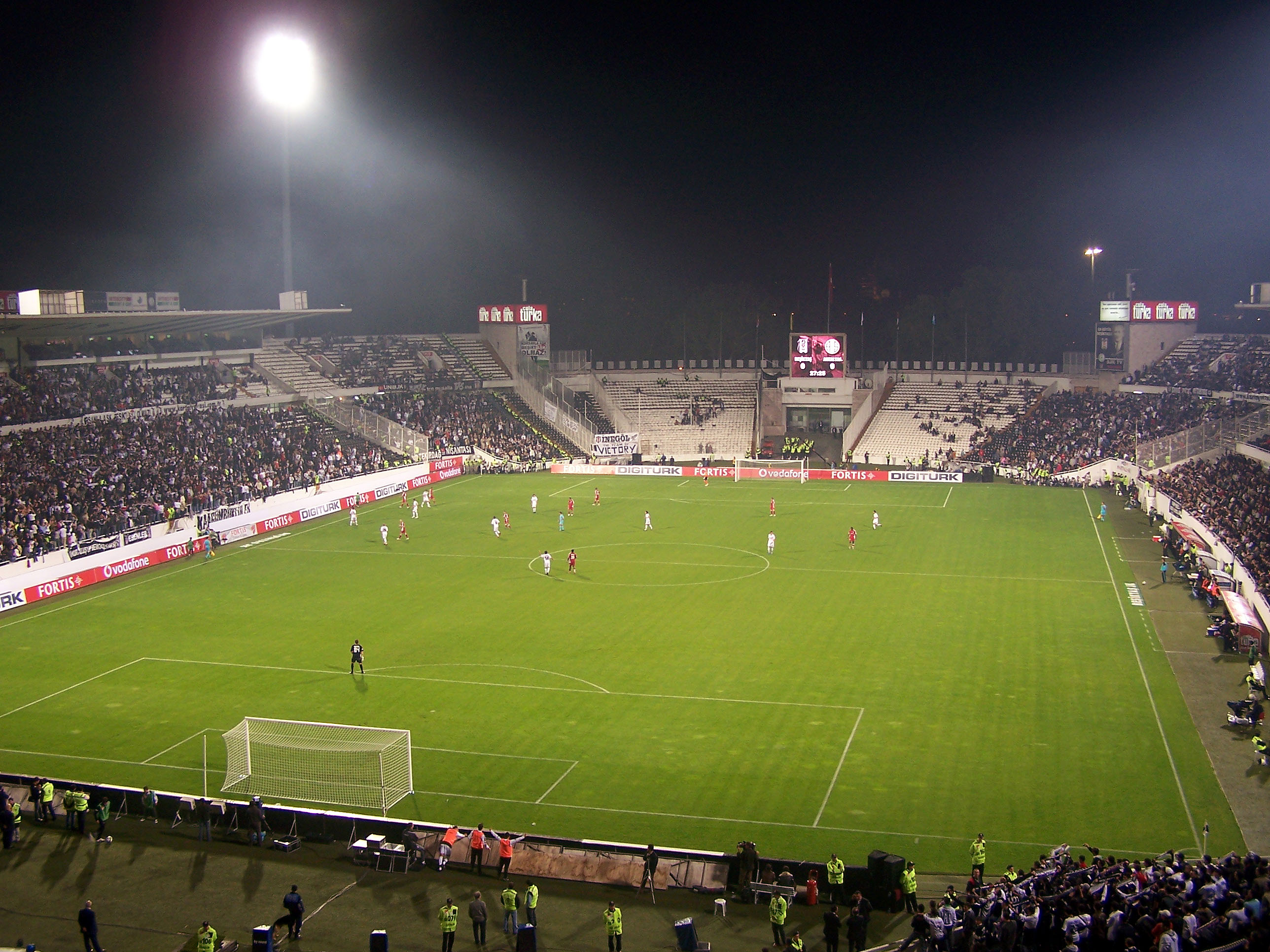 Beşiktaş - Antalyaspor Turkish Cup match on 30 October 2008 at İsmet İnönü Stadium. View from the Yeni Açık stand.